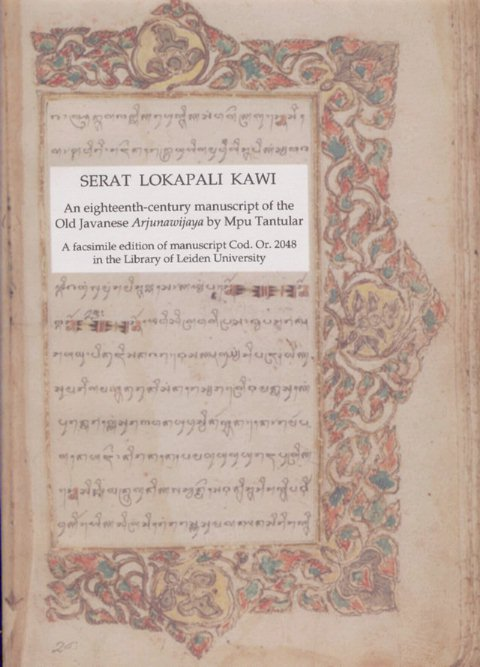 Kaft van een boek.